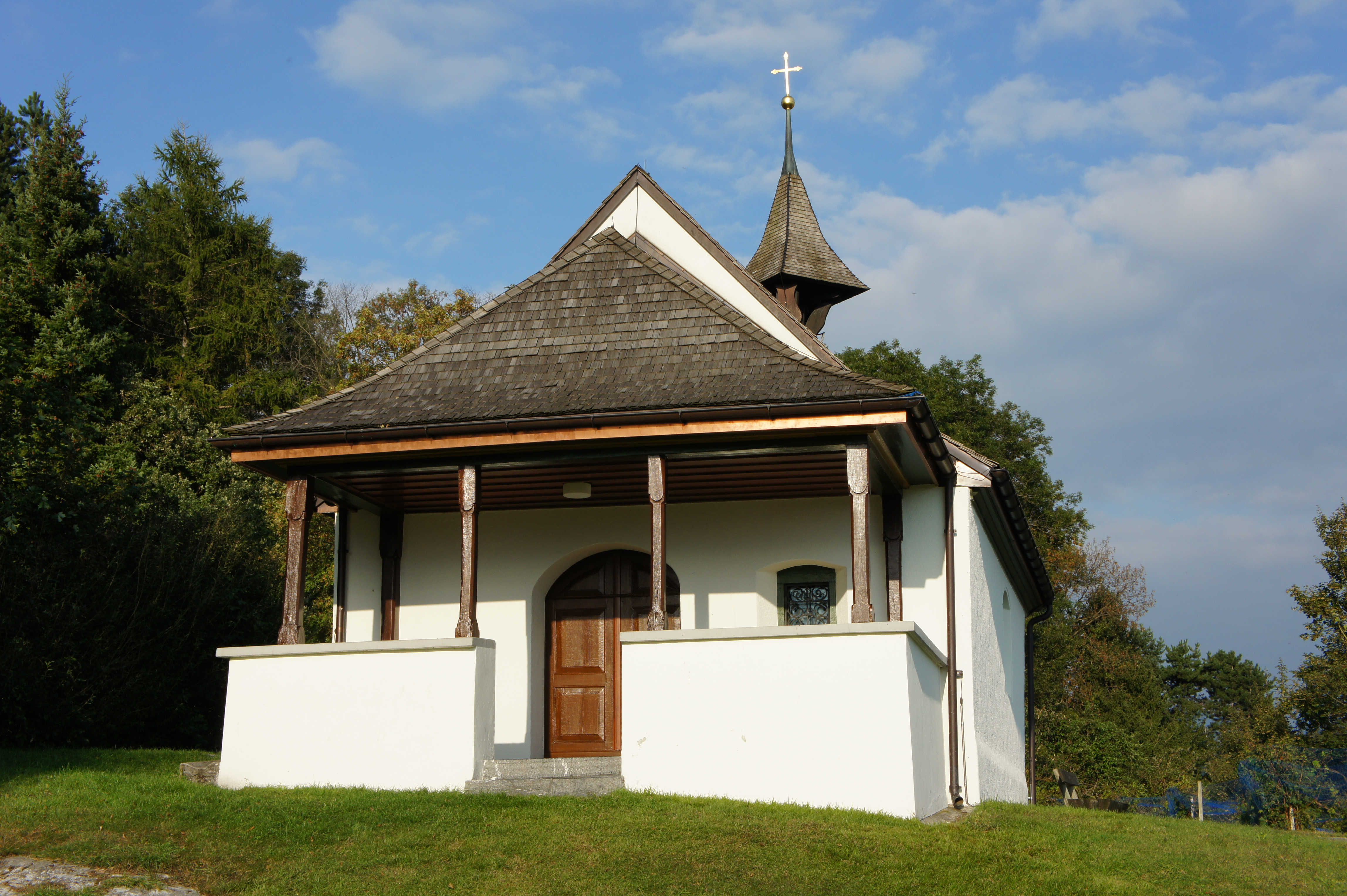 Die St. Anna-Kapelle auf dem Montlingerberg aus westlicher Richtung. Der Eingangsbereich ist ummauert und überdacht. Ein kleines Klockentürmchen steht auf der Ostseite des Giebeldaches der Kapelle.